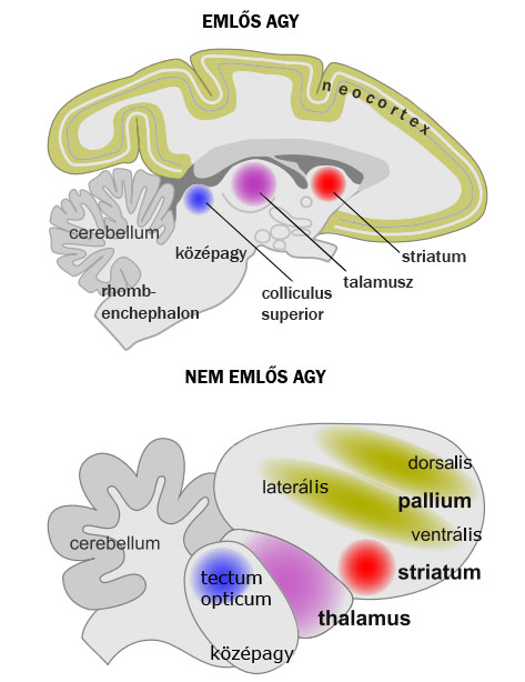 Összehasonlító kép